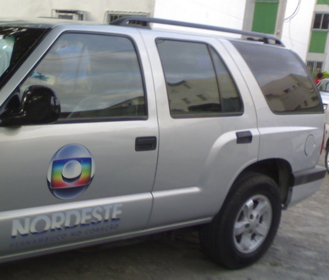 Veículo de reportagem da Rede Globo NE em Recife, PE.